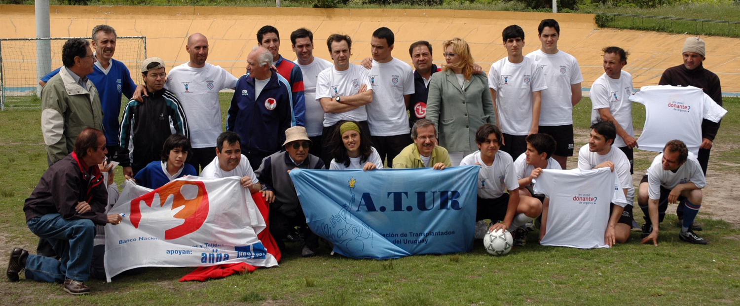 Actividad deportiva de ATUR, comúnmente coordinadas con el INDT. Así como también con otras organizaciones de trasplantados.